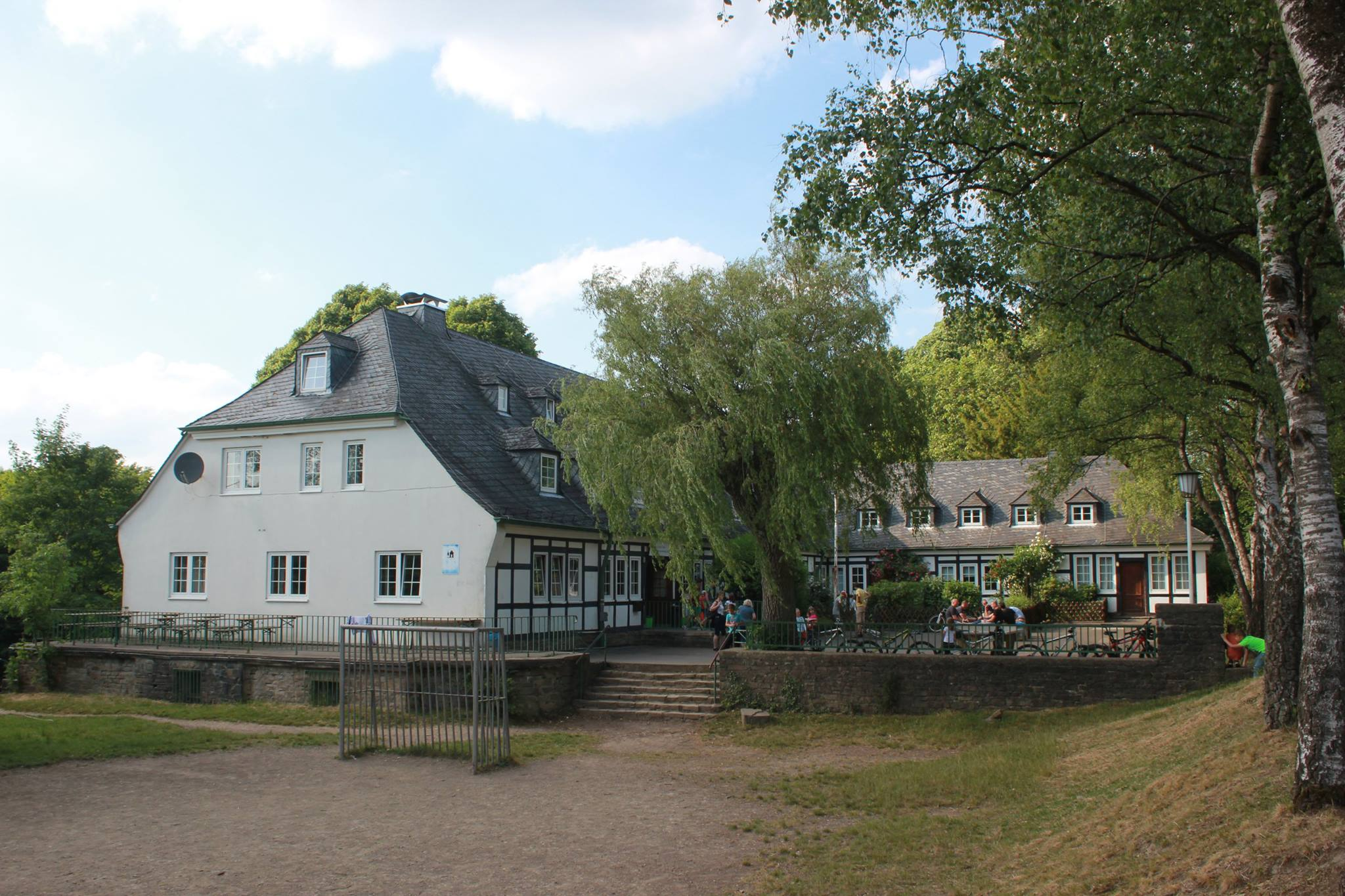 Jugendherberge in Oberburg, An der Jugendherberge, aufgenommen im Sommer 2015